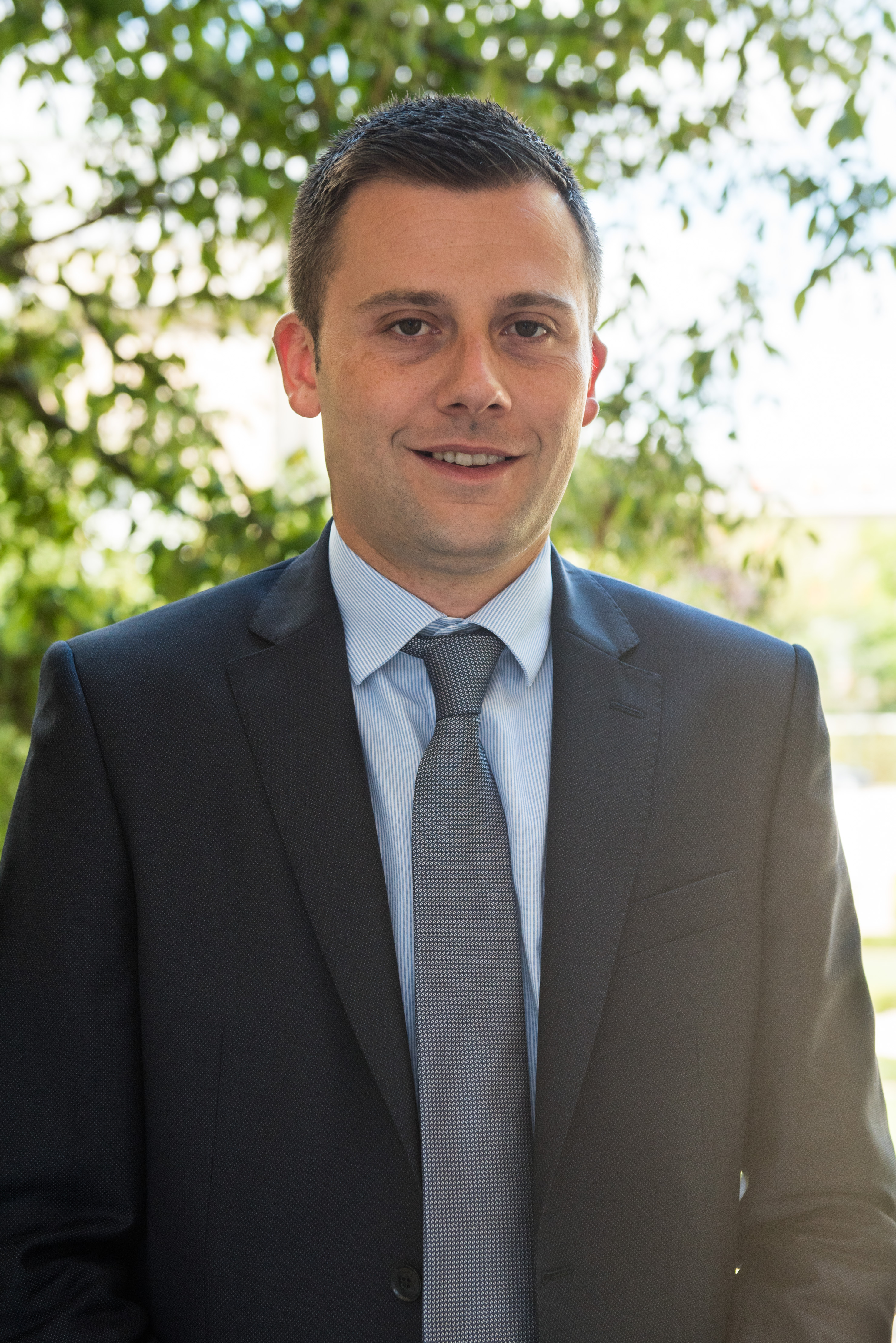 Ian Boucard dans le jardin des Quatre colonnes du palais Bourbon en 2017.